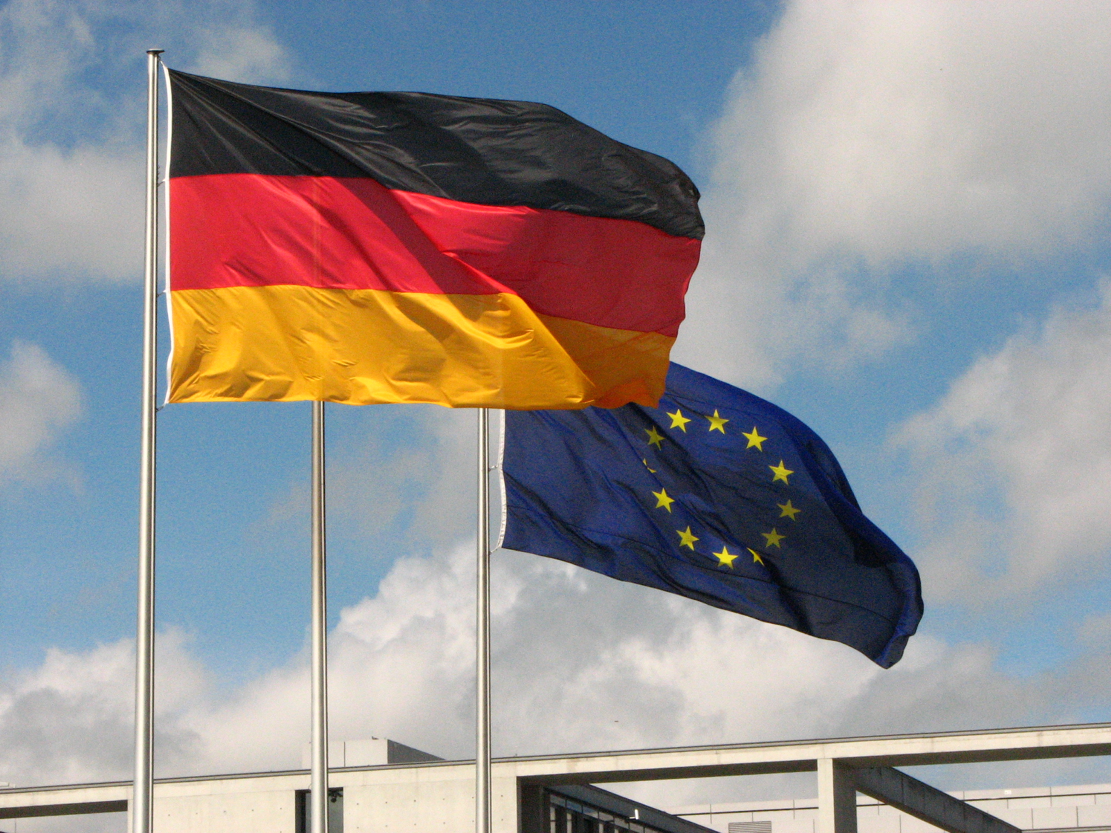 German flag